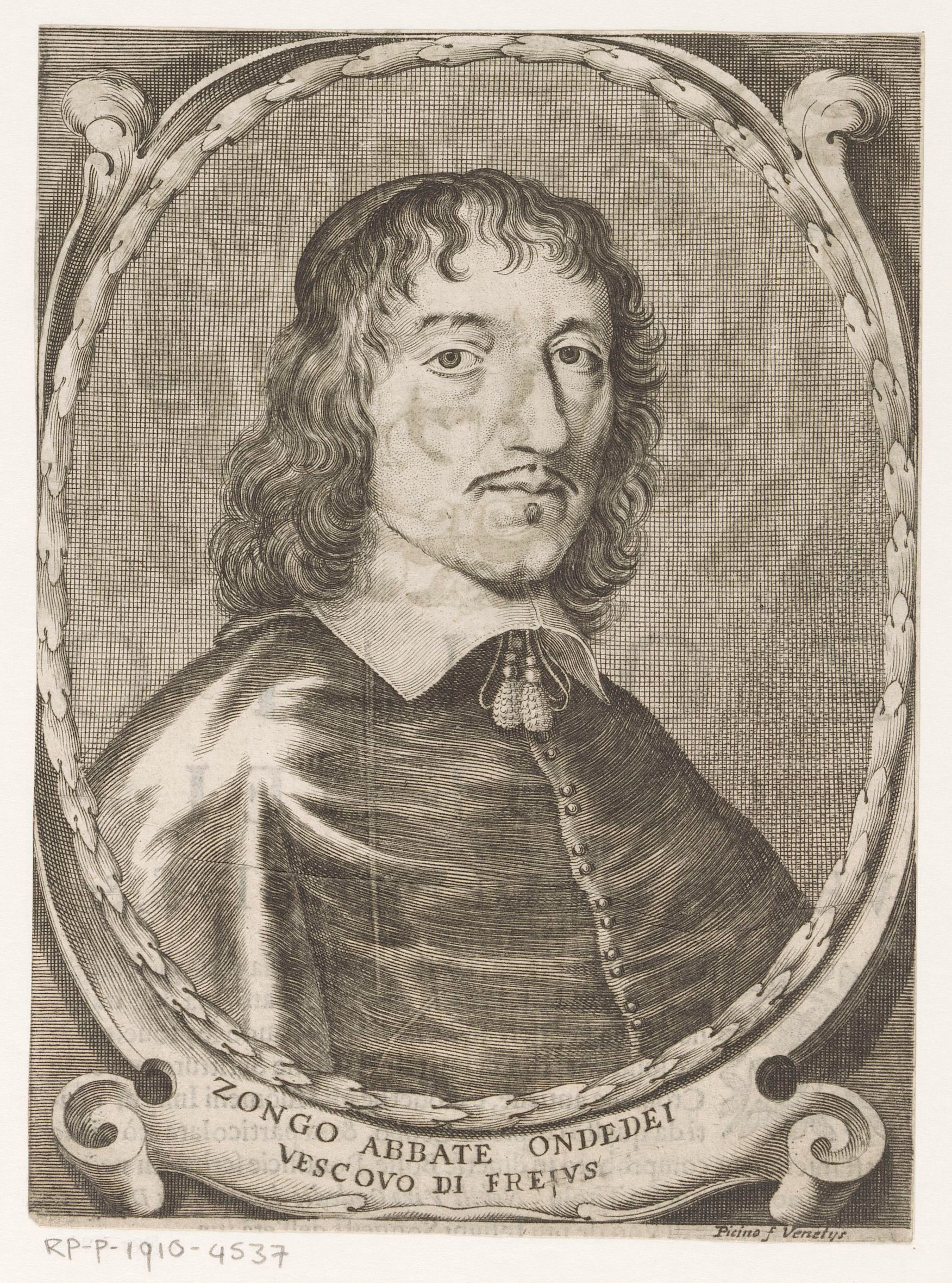 IdentificatieTitel(s): Portret van bisschop Zonga OndedeiObjecttype: prent boekillustratie Objectnummer: RP-P-1910-4537Opschriften / Merken: verzamelaarsmerk, verso, gestempeld: Lugt 2228VervaardigingVervaardiger: prentmaker: Giacomo Piccini (vermeld op object)uitgever: Andrea GiulianiPlaats vervaardiging: VenetiëDatering: 1659Fysieke kenmerken: gravure; verso met tekst in boekdrukMateriaal: papier Techniek: graveren (drukprocedé) / boekdrukAfmetingen: blad: h 176 mm (Binnen plaatrand afgesneden.) × b 130 mm (Binnen plaatrand afgesneden.)ToelichtingPrent uit de publicatie: Priorato, Galeazzo Gualdo. Scena d'huomini illustri d'Italia. Venetië: Andrea Giuliani, 1659.OnderwerpWat: historical personsarchbishop, bishop, etc. (Roman Catholic)Wie: Joseph Zongo OndedeiVerwerving en rechtenVerwerving: aankoop 1905Copyright: Publiek domein